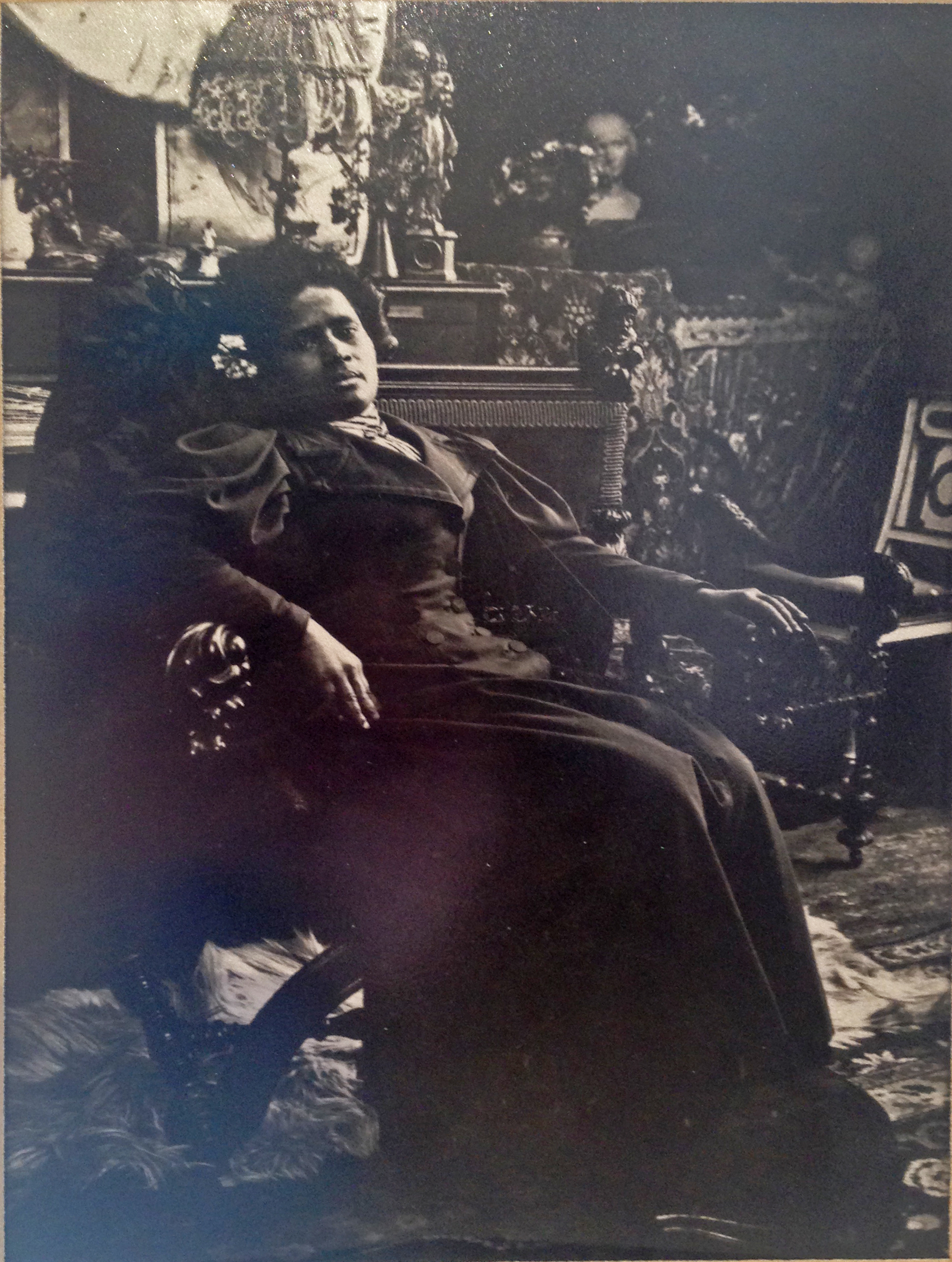 Gauguin's mistress. rue de la Grande Chaumiere, Paris 1894